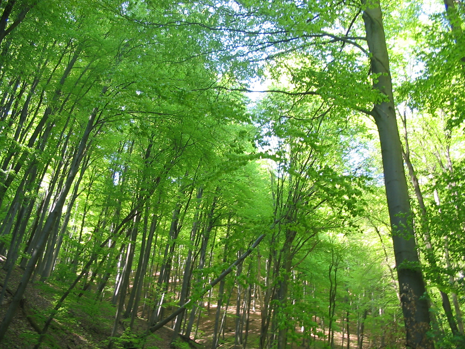 Forest landscape near Óbánya, a village in Baranya county, Hungary. The area is part of Mecsek Mountains. The forest mainly consists of beech trees. Erdei tájkép Óbánya közelében, ami egy falu Baranya megyében, Magyarországon. A terület a Mecsek-hegység része. Az erdő javarészt bükkfákból áll.